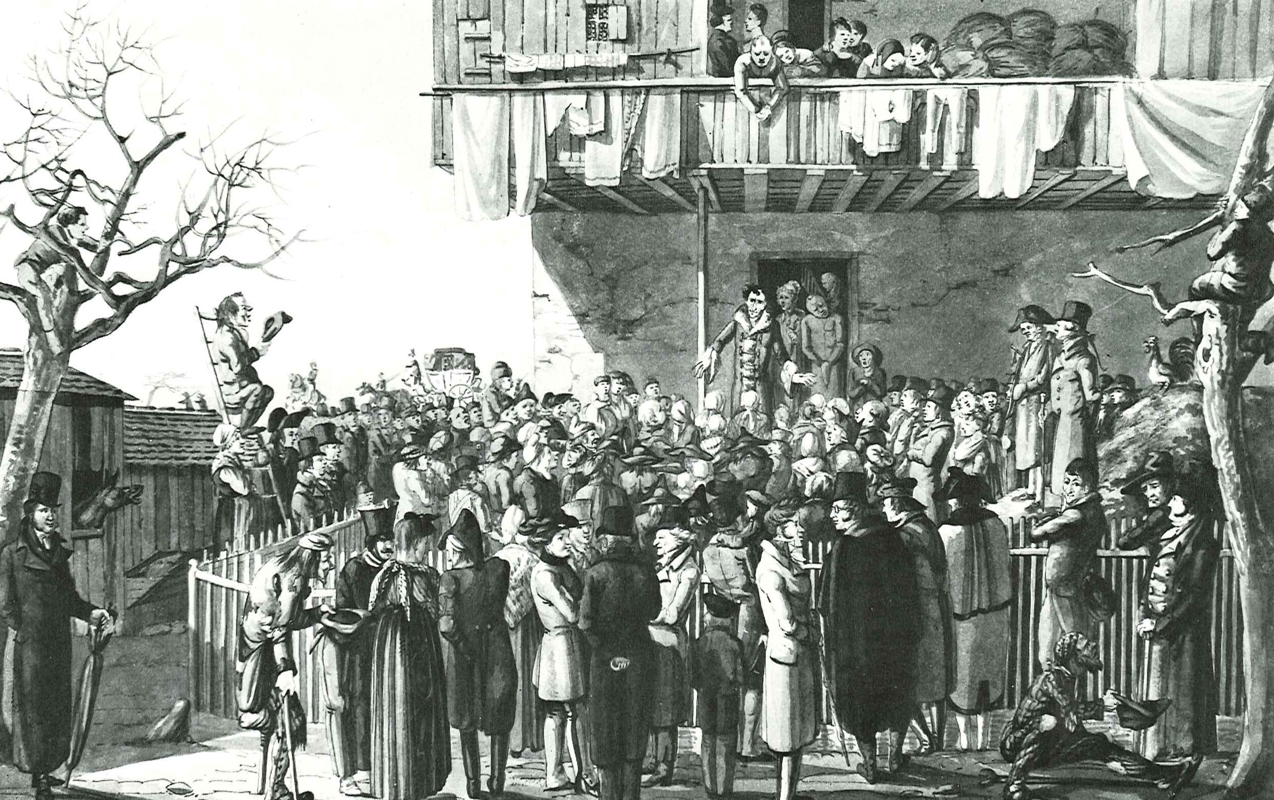 Menschenauflauf in Grenzach bei Basel anlässlich des Aufenthalts der radikalpietistischen Mystikerin Juliane von Krüdener, 1817. Aquarell von Hieronymus Hess (1799–1850)